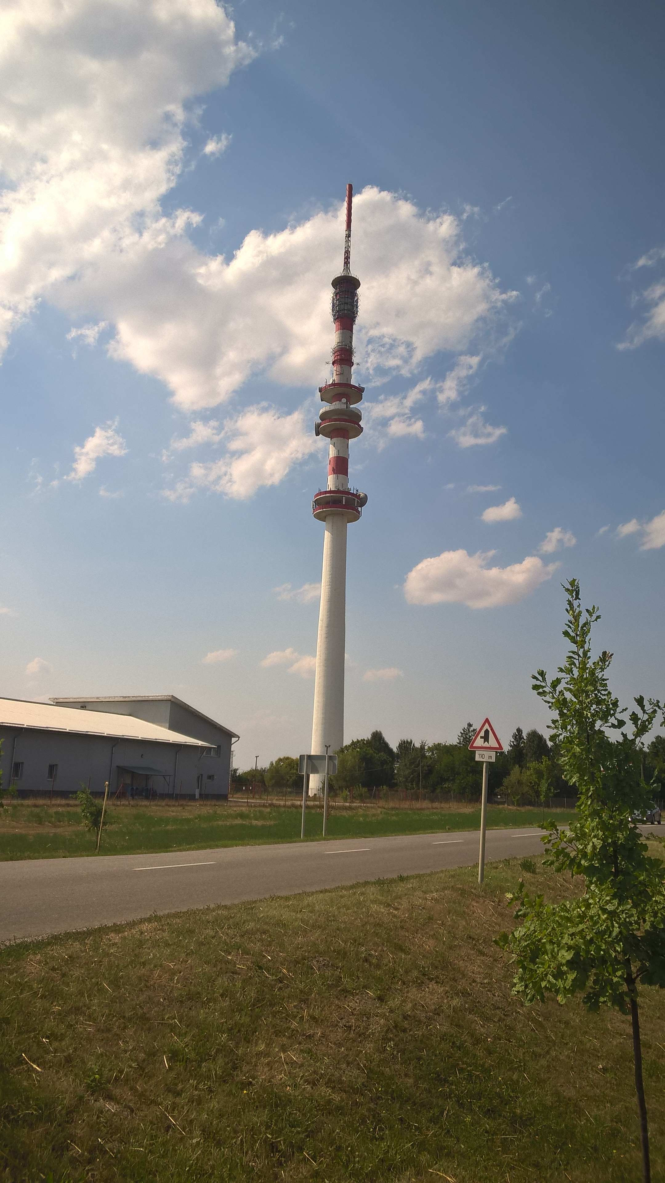 Komádi TV torony. TV-URH gerincadó állomás, 186 m magas, 1968-ban épült.